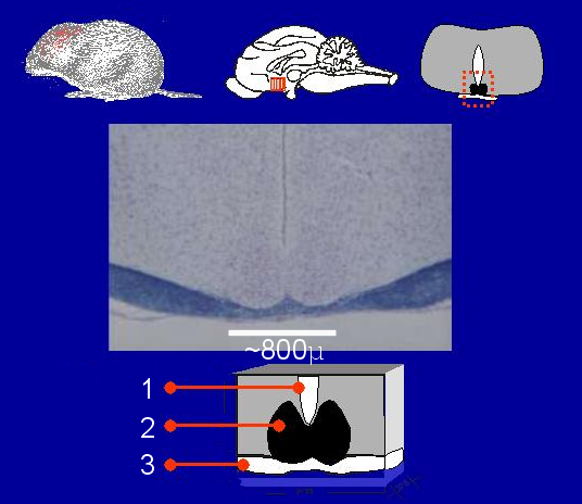 SupraChiasmatischeNucleus